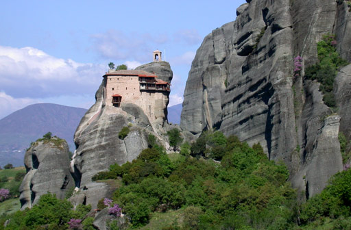 Description : Météores, monastère Saint Nicolas Date : 14 avril 2004 Auteur : Ifernyen Source : Archives personnelles Statut : GFDL Ifernyen